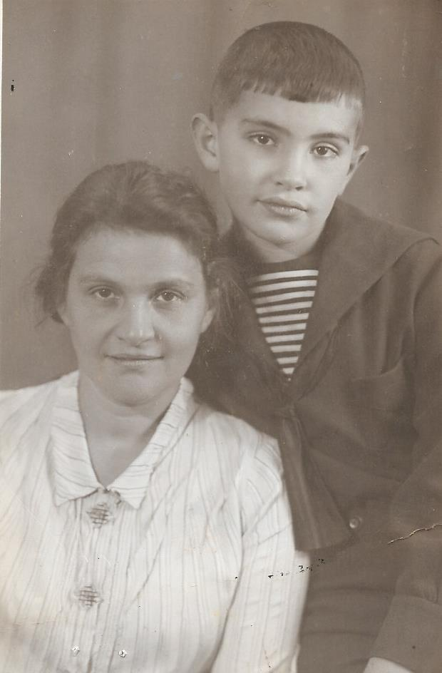 הדודה ניוטה ממוסקבה עם בנה פליקס